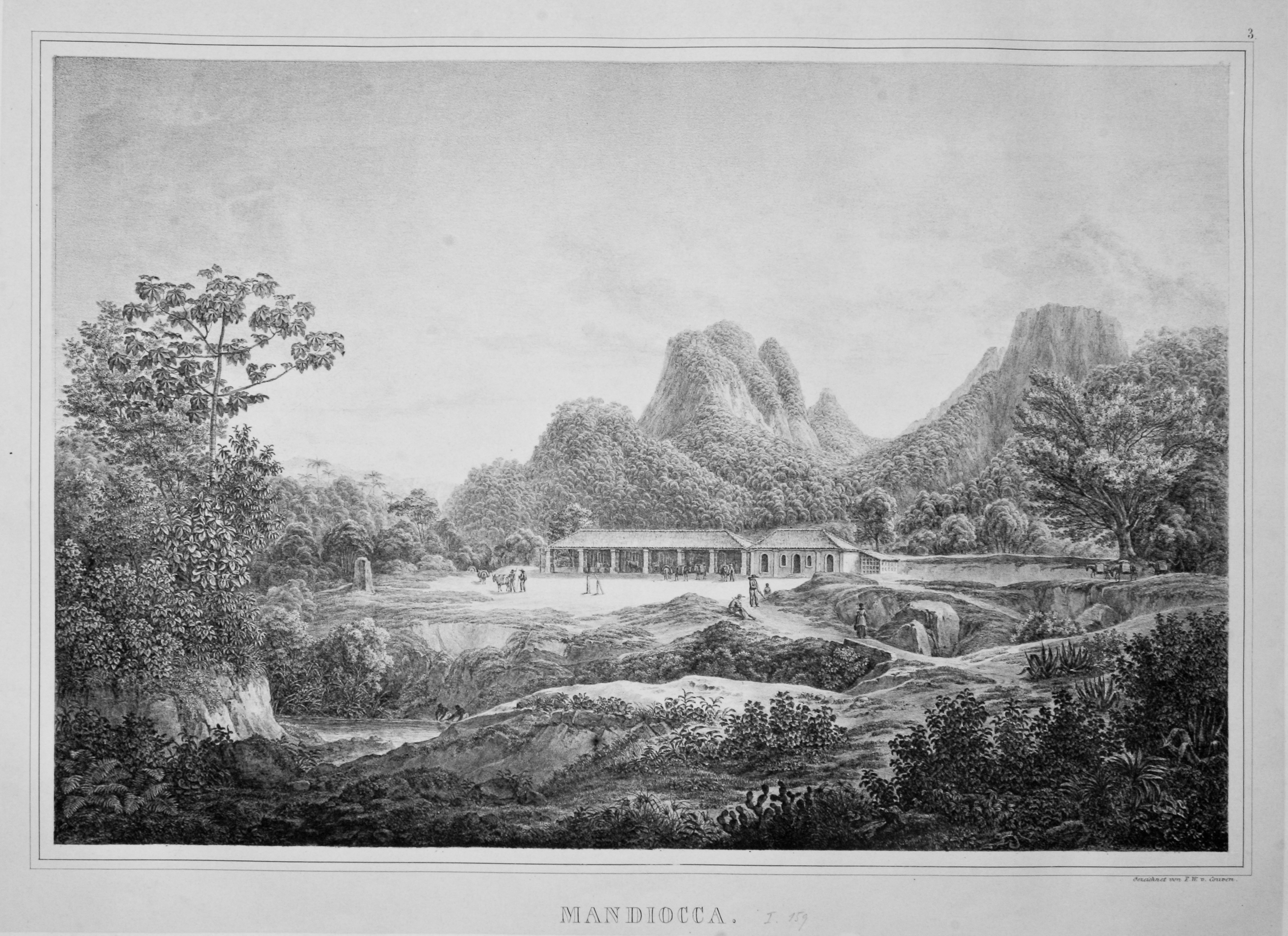 Orignial-Dateien der Digitalisierung von Spix' Reiseatlas (1823-1831 Reise in Brasilien auf Befehl Sr. Majestät Maximilian Joseph I. König von Baiern in den Jahren 1817-1820 gemacht und beschrieben - Atlas)